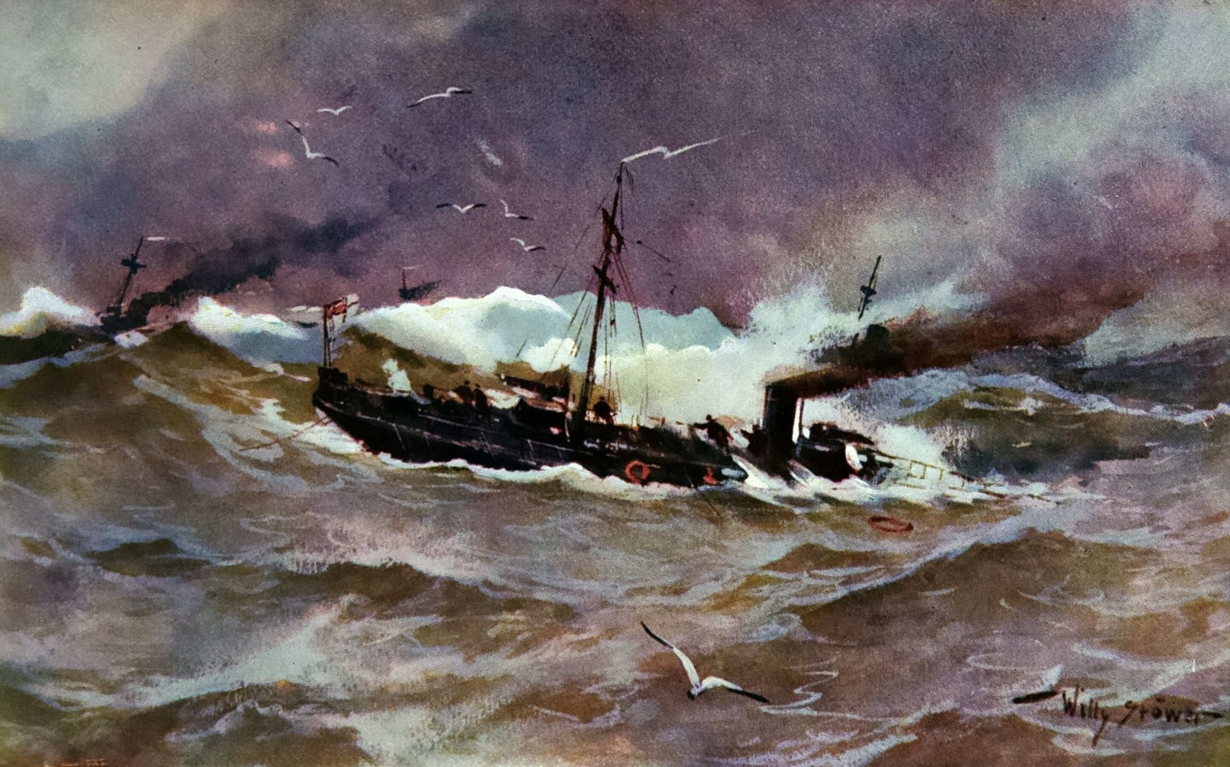 Torpedoboot S 26 kurz vor seinem Untergang in der Elbmündung bei Cuxhaven.